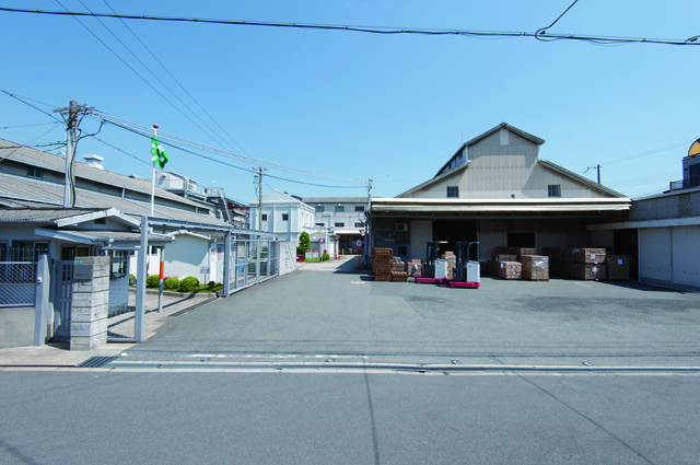 シード本社工場